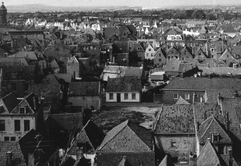 Gesaneerde deel van de binnenstad. In het midden rechts is het Zeemanserve te zien. De overige straten waaronder korte en lange zelke, kolvenierstraat zijn verdwenen